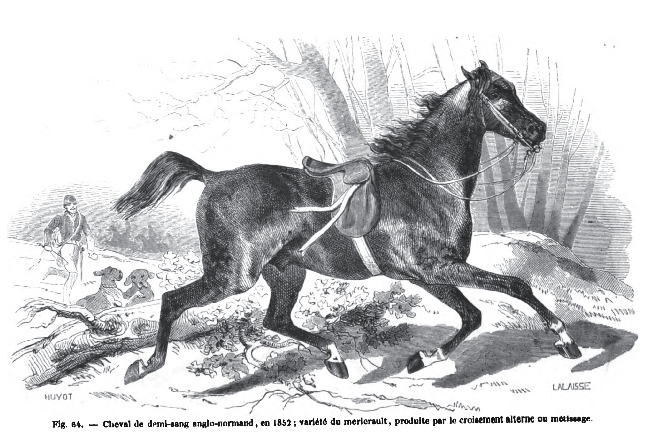 Anglo-Norman